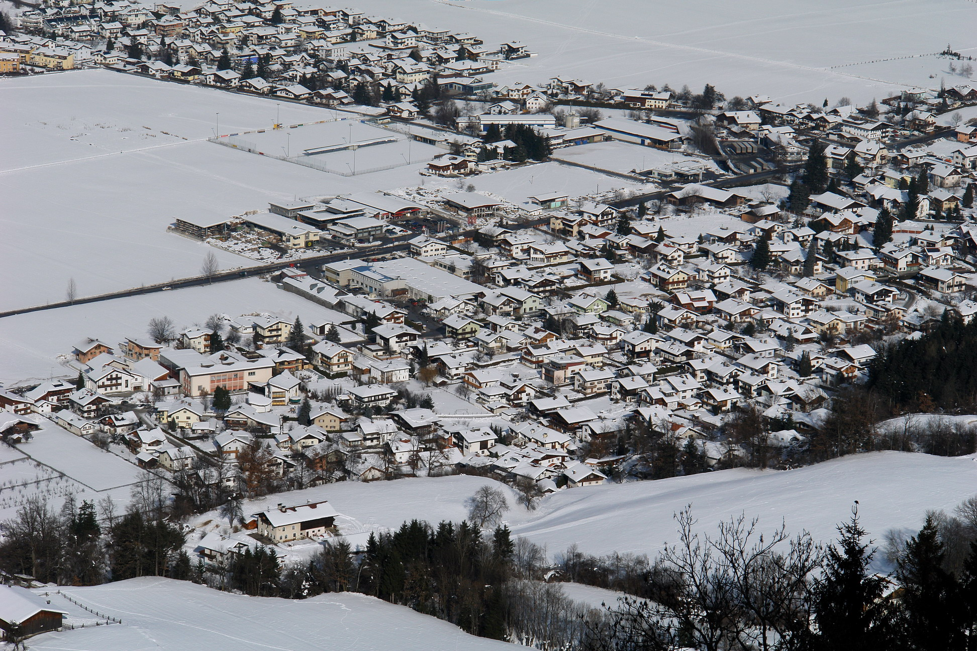 Kolsass, Tirol